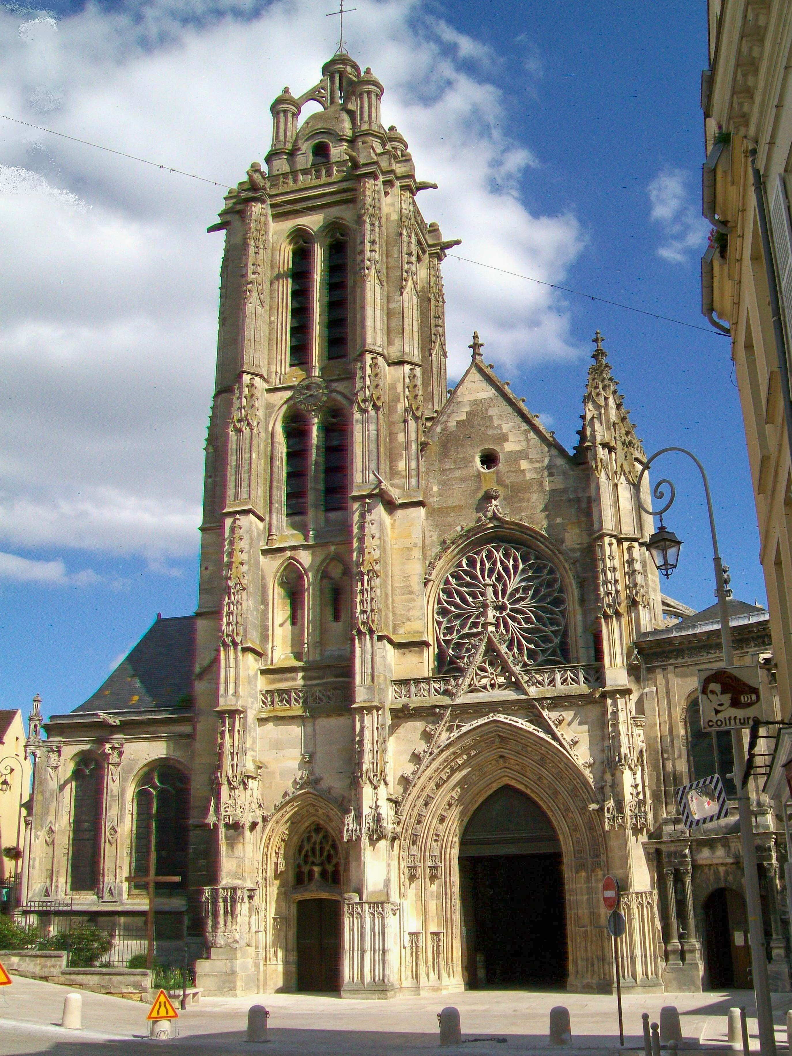 La cathédrale Saint-Maclou, façade occidentale, depuis la rue de la Coutellerie.